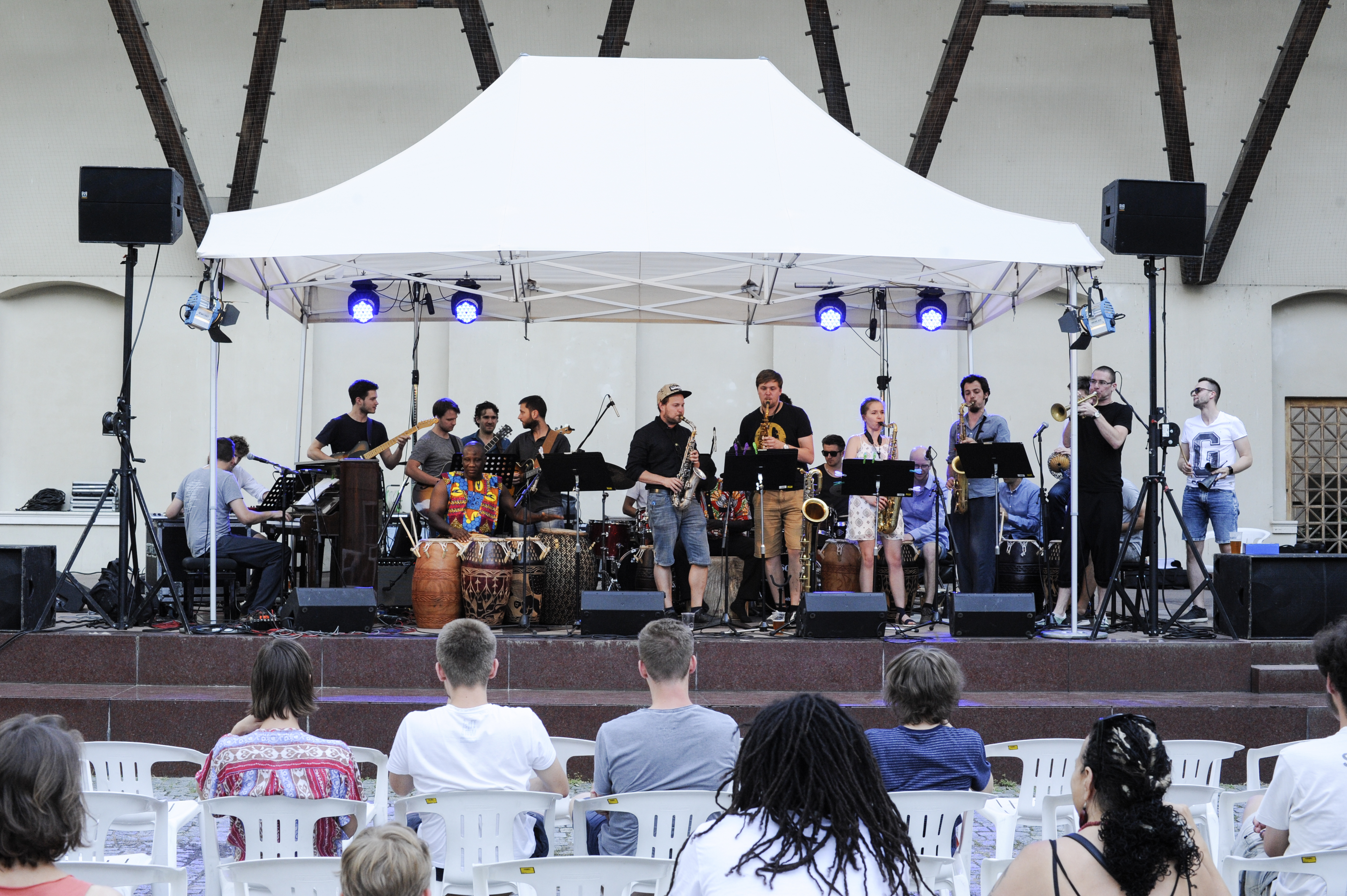 Jazzové nádvoří v roce 2018.